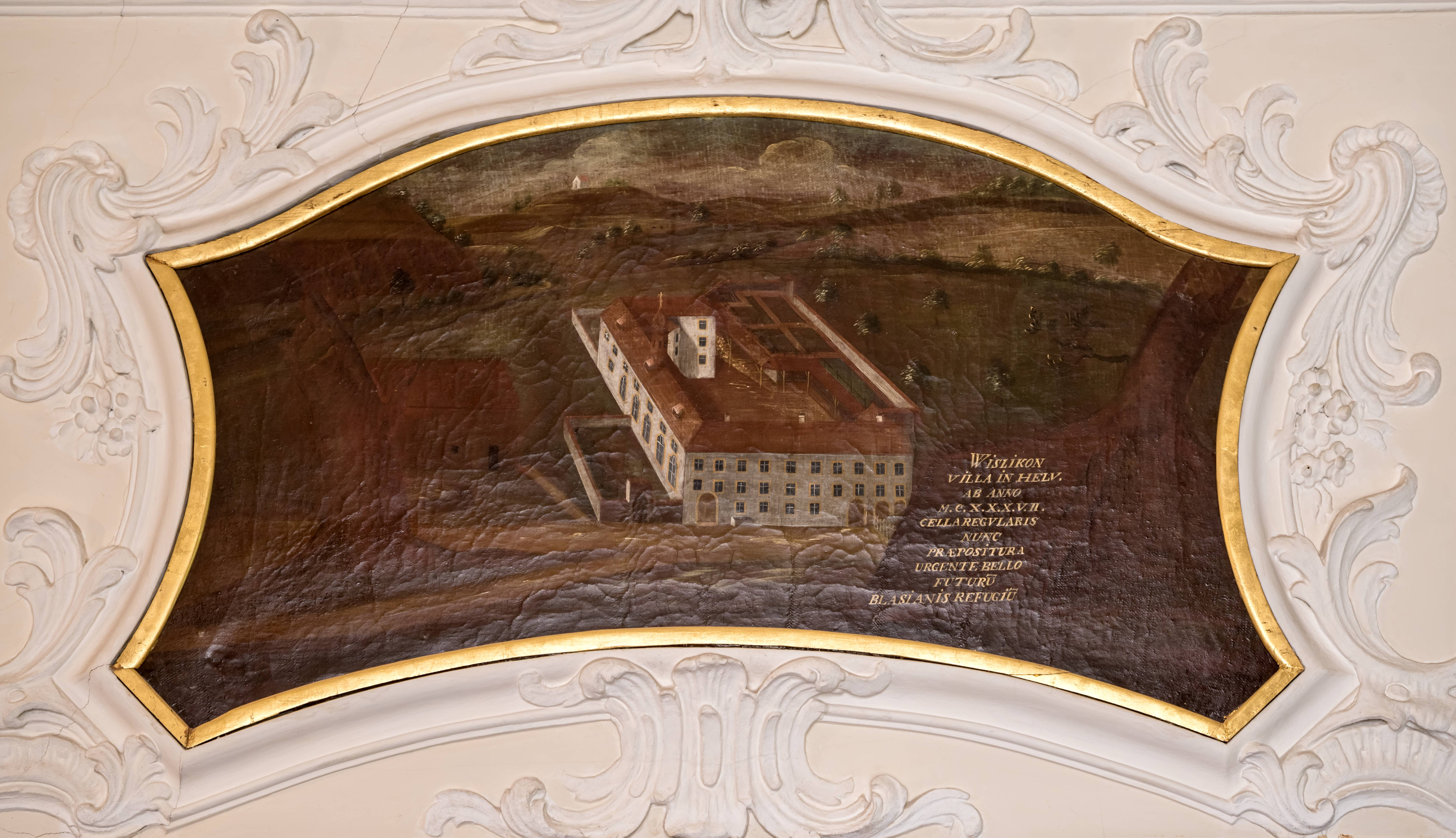 Bilder aus dem Schloß Bürgeln Hier Bilder von den Supraporten im ersten Stock des Schloßes. Es sind Bilder der Probsteien des Kloster St. Blasien und einige Füllbilder in einem später erstellten Flügel WILSIKON VILLA IN HELV. AB ANNO M.C.X.X.X. V. II. CELLA REGVLARIS NUNC PRAEPOSITURA URGENTE BELLO FUTURU BLASIANIS REFUGIU